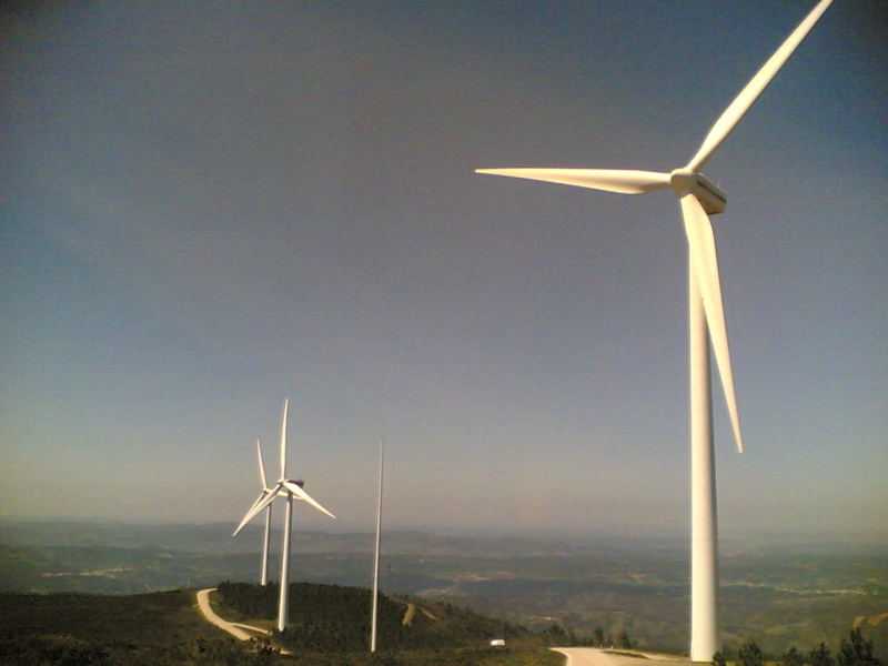 Parque eólico de Vila Nova, próximo de Condeixa, Portugal